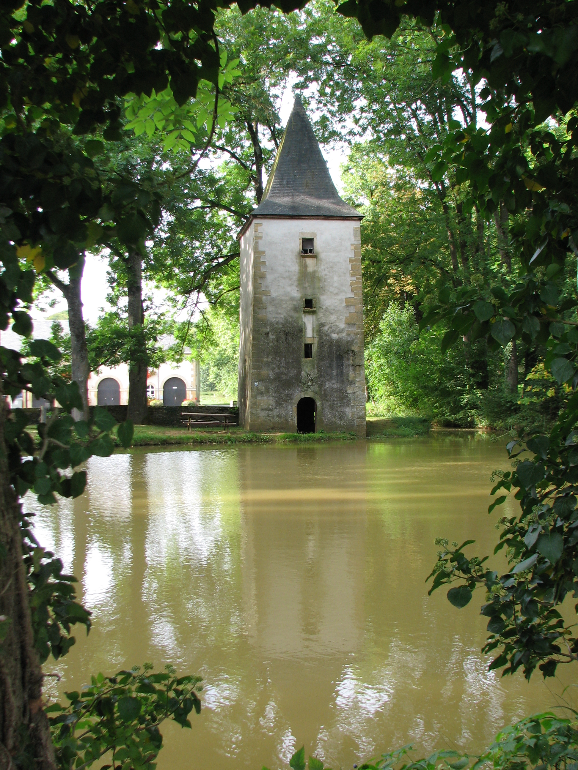 Le domaine de Clémarais, à Aubange